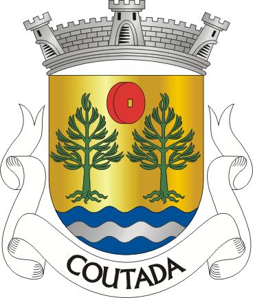 Brasão de Coutada